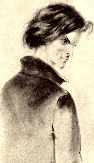 Раскольников. Рисунок П. Боклевского. 1880-е годы